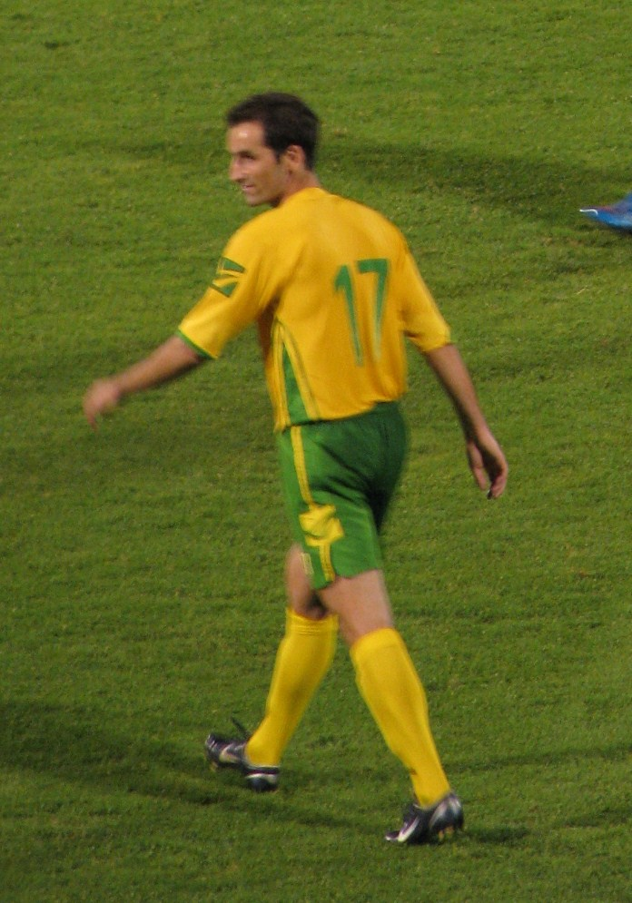 Dragan Župan 2009.jpg